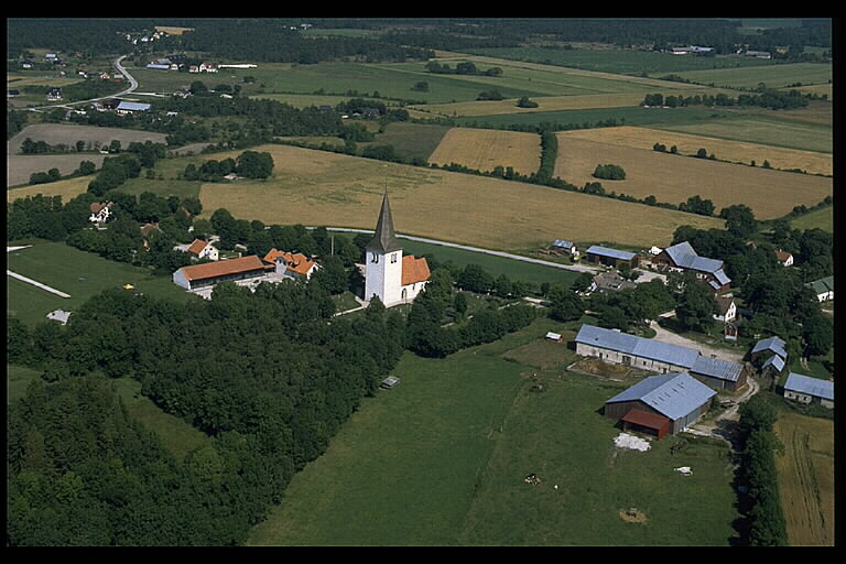 Motiv: Hangvars kyrka Nyckelord: Flygbilder, Riksintressen Kategori: KyrkbyHangvars kyrka